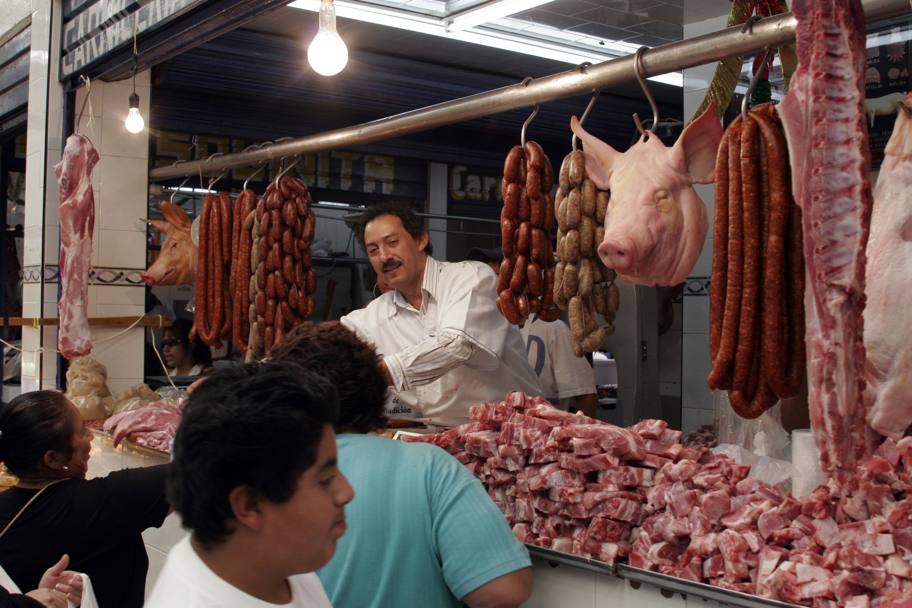 Meat market at Tenancingo, Estado de Mexico, Mexico